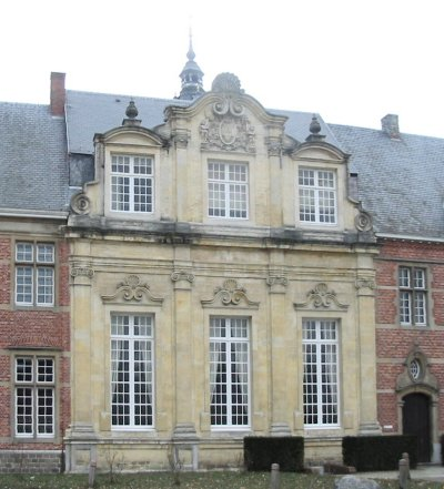 Abdij Postel, eigen foto